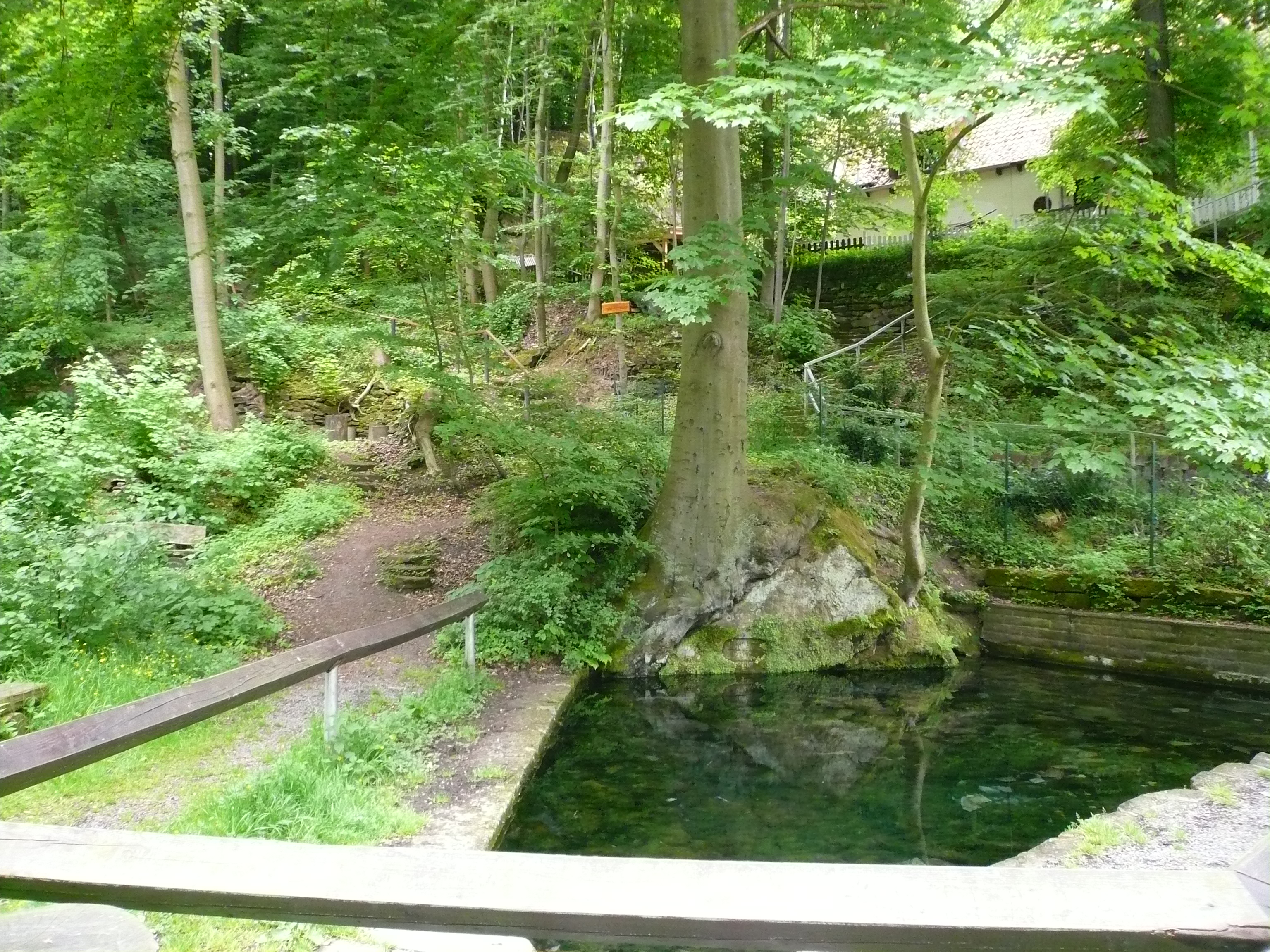 Quellteich des Rauschenwasser in Mariaspring, im Hintergrund Reste der Terrassenanlagen der ehemaligen Ausflugsgastwirtschaft